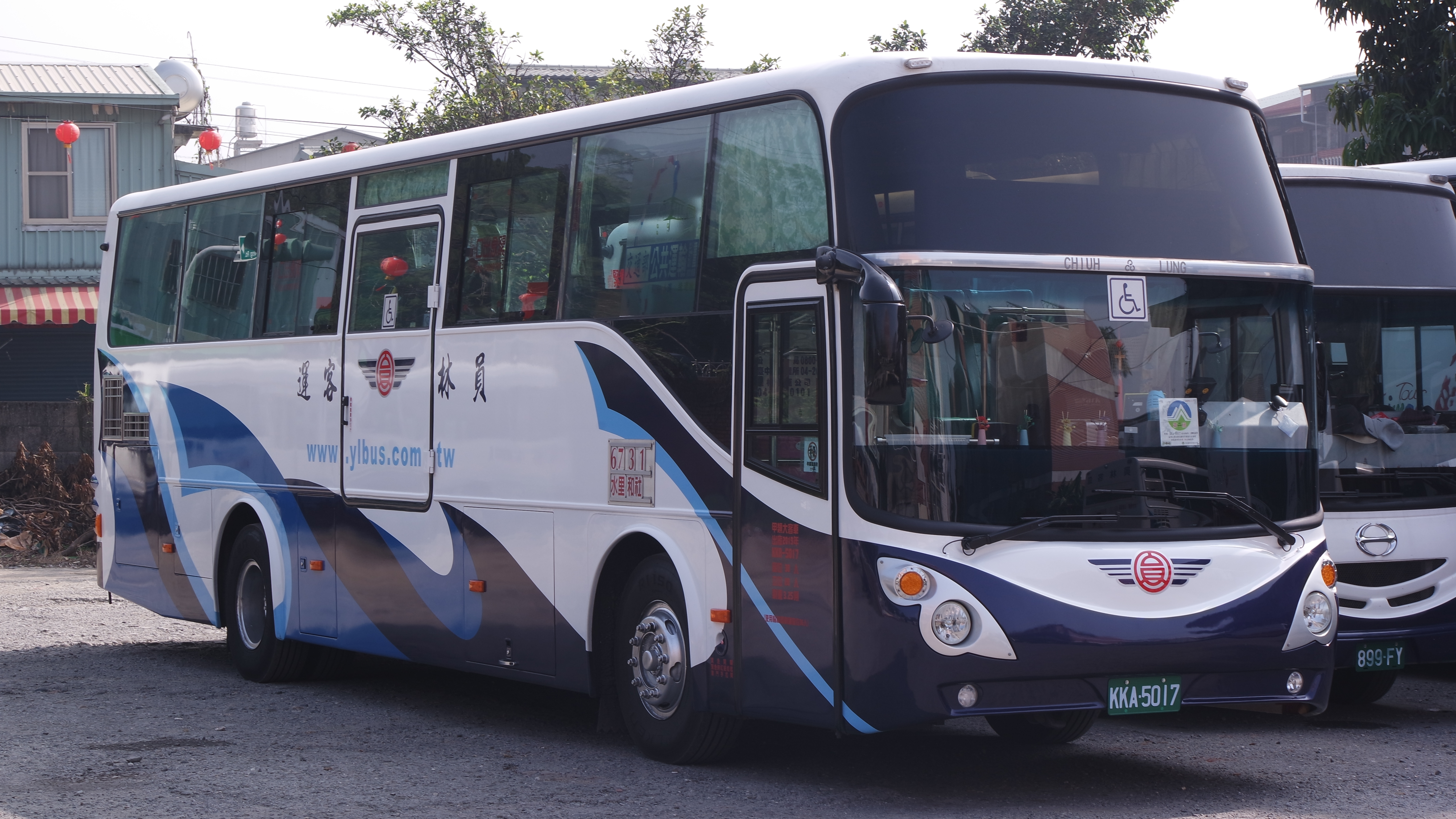 水里鄉員林客運高地板無障礙巴士KKA-5017